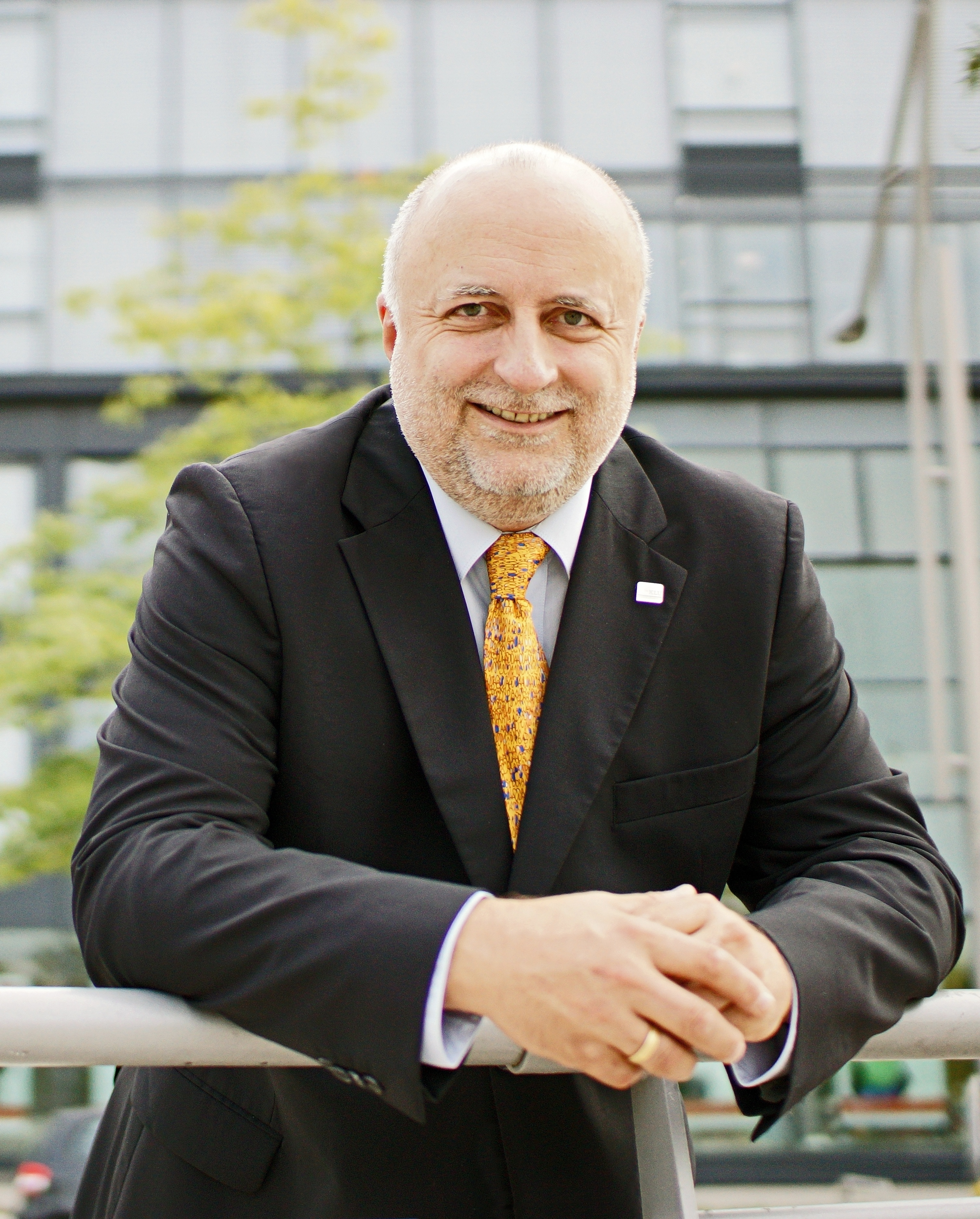 Prof. Dr. Thomas Strothotte